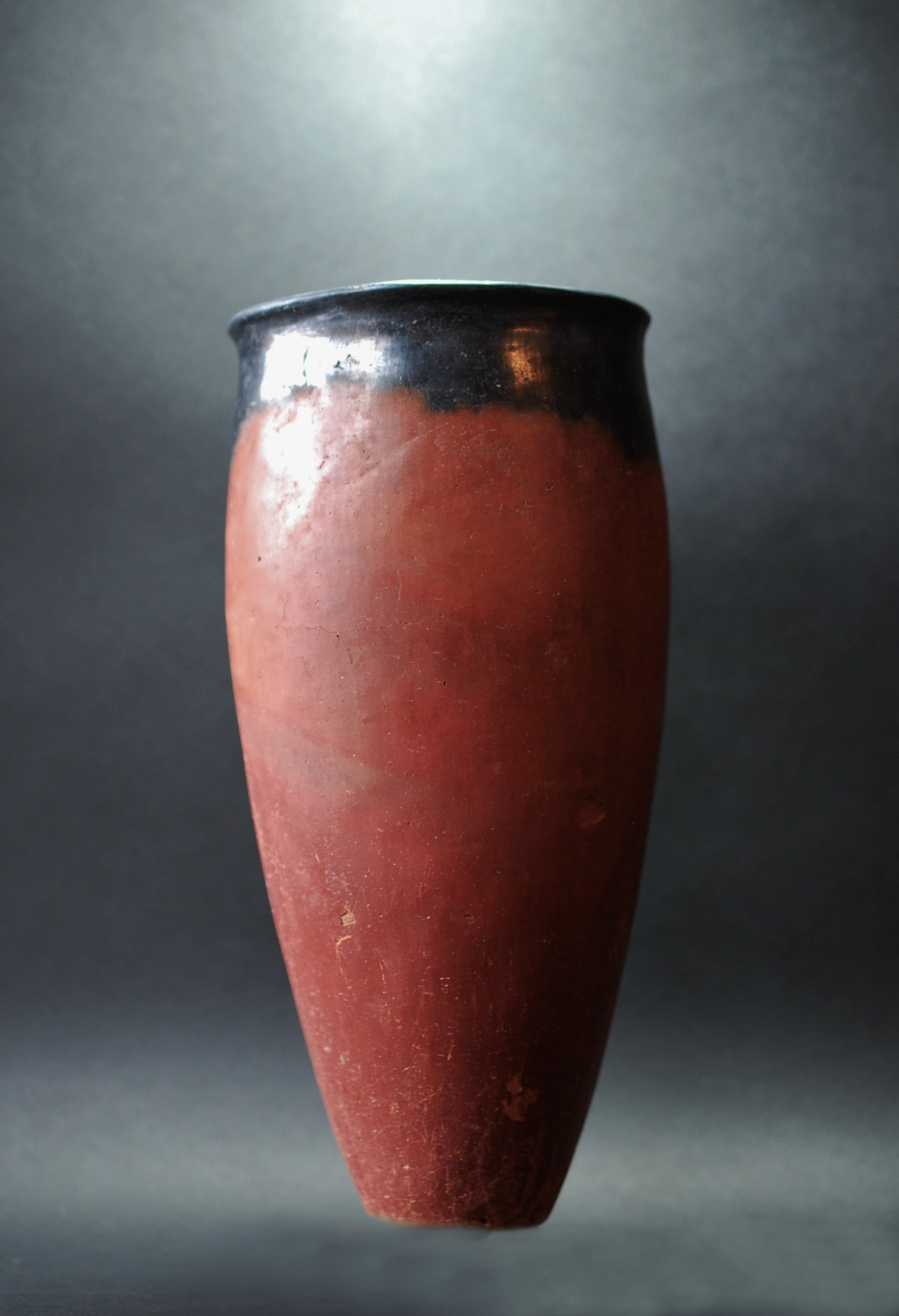 Vase pré dynastique égyptien, Nagada I, entre -3800 et -3600 avant notre ère